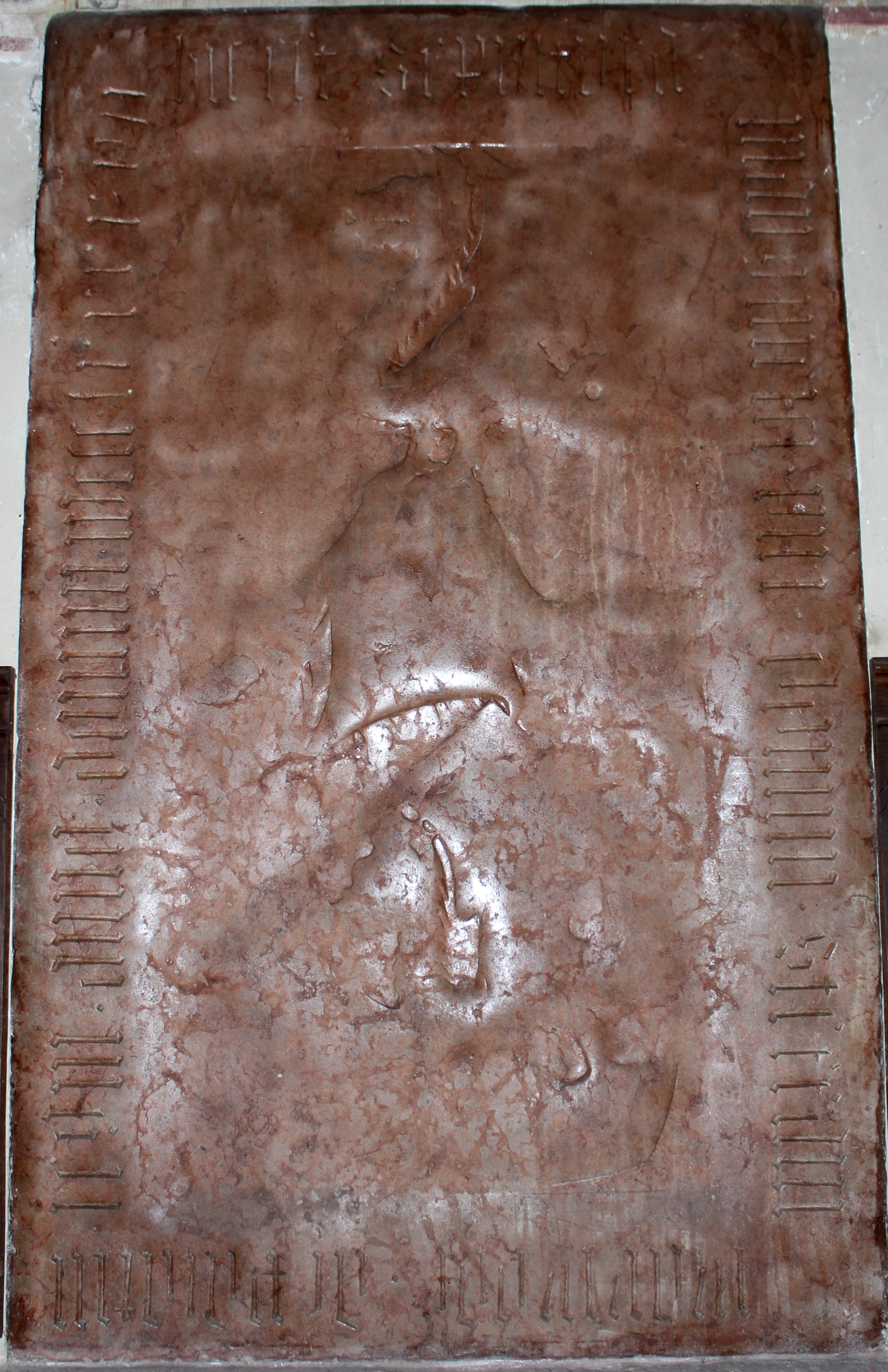 Lackfi István (1340–1397) erdélyi vajda, nádor sírköve a keszthelyi ferences templomban